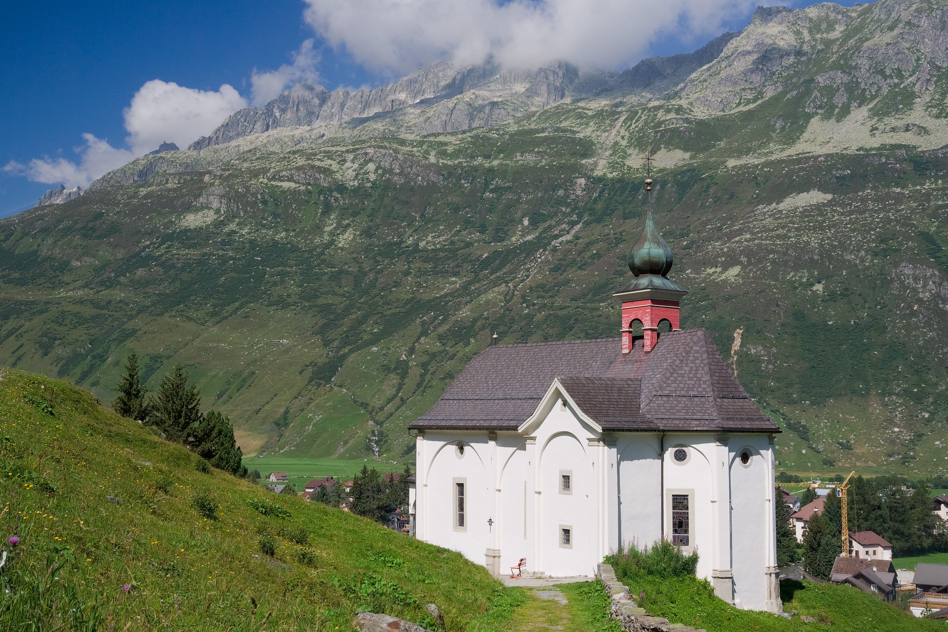 Die Maria-Hilf-Kapelle in Andermatt